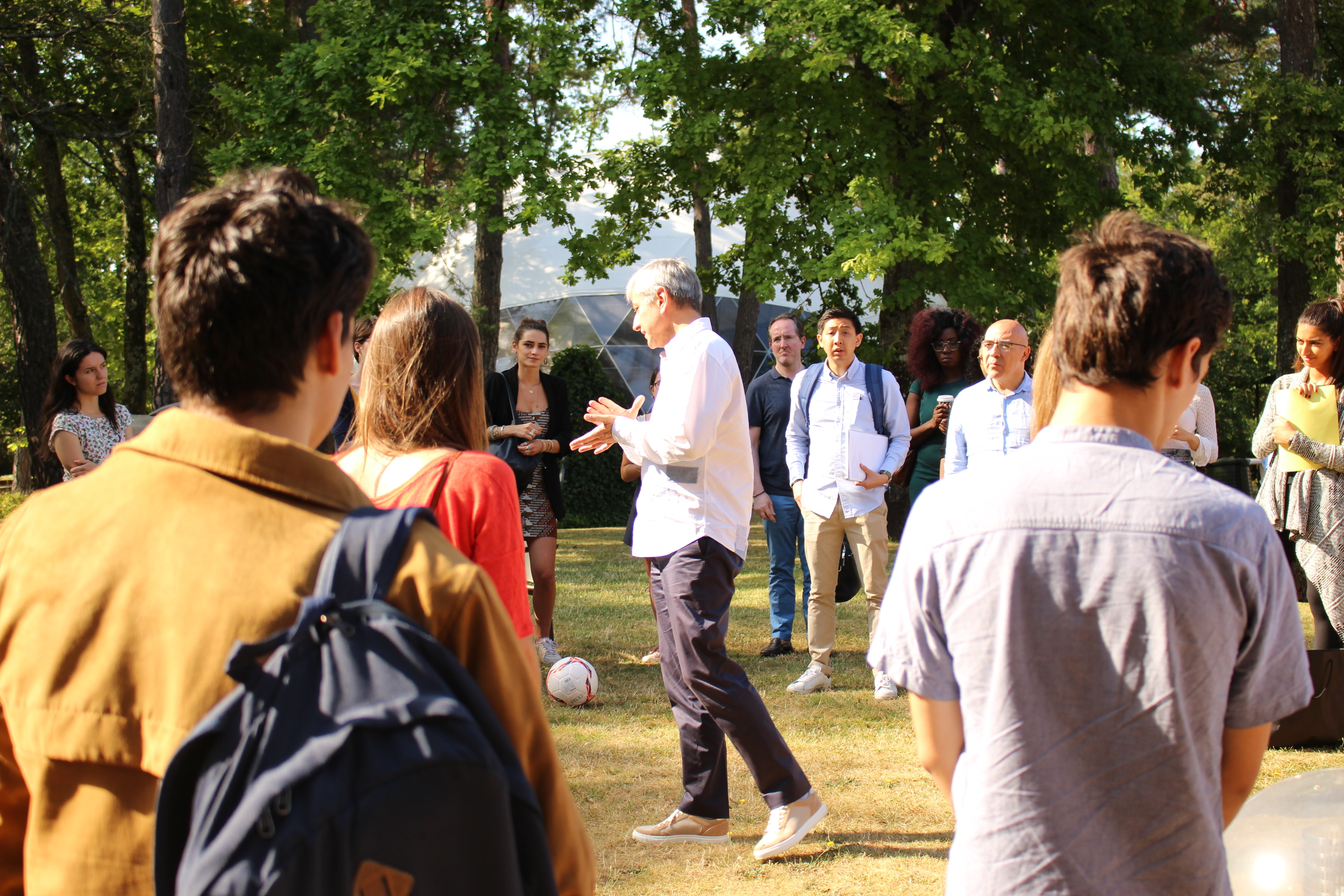 Discours de Jean-Philippe Courtois durant un événement de son association Live for Good